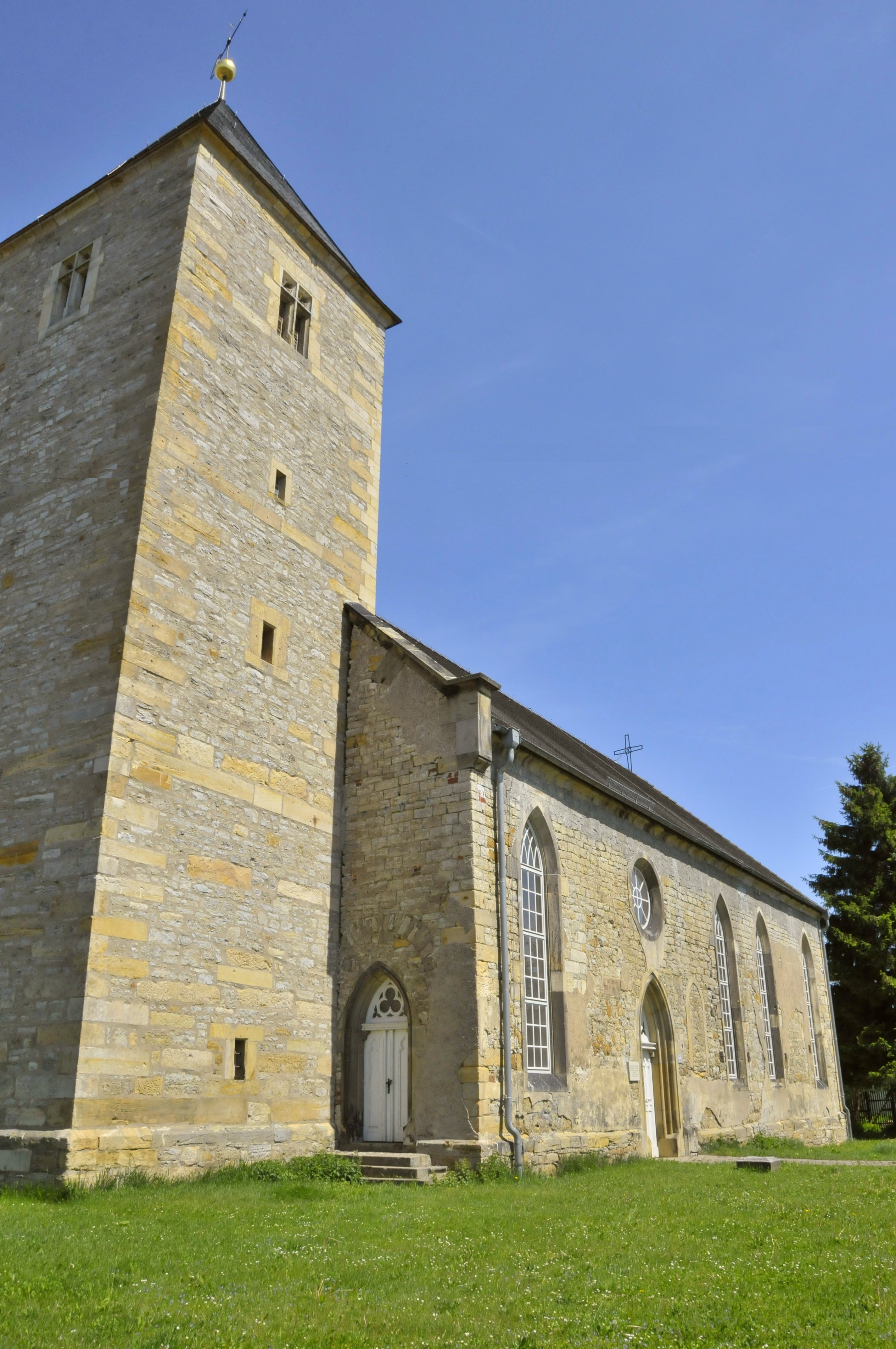 Die Dorfkirche St. Ulrich oder auch Ulrichskirche (von 1510) im Erfurter Ortsteil Alach - Thüringen, Deutschland.